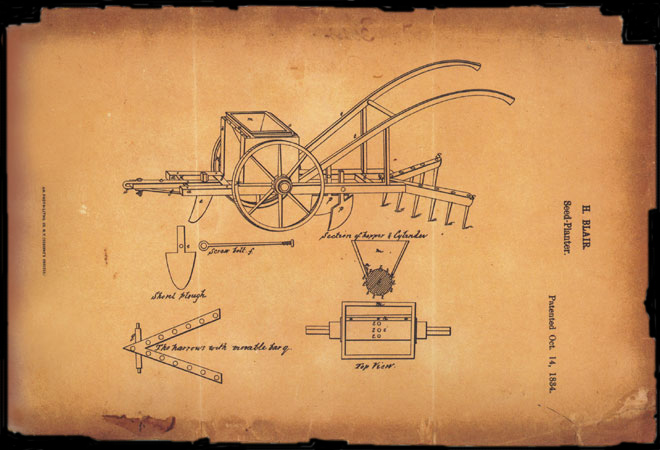 US Patent 8447X: seed planter